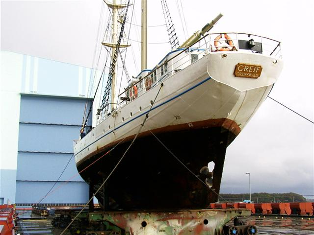 Die Greif in der Werft zur regelmäßigen Überprufung und Überholung unter Beaufsichtigung des GL